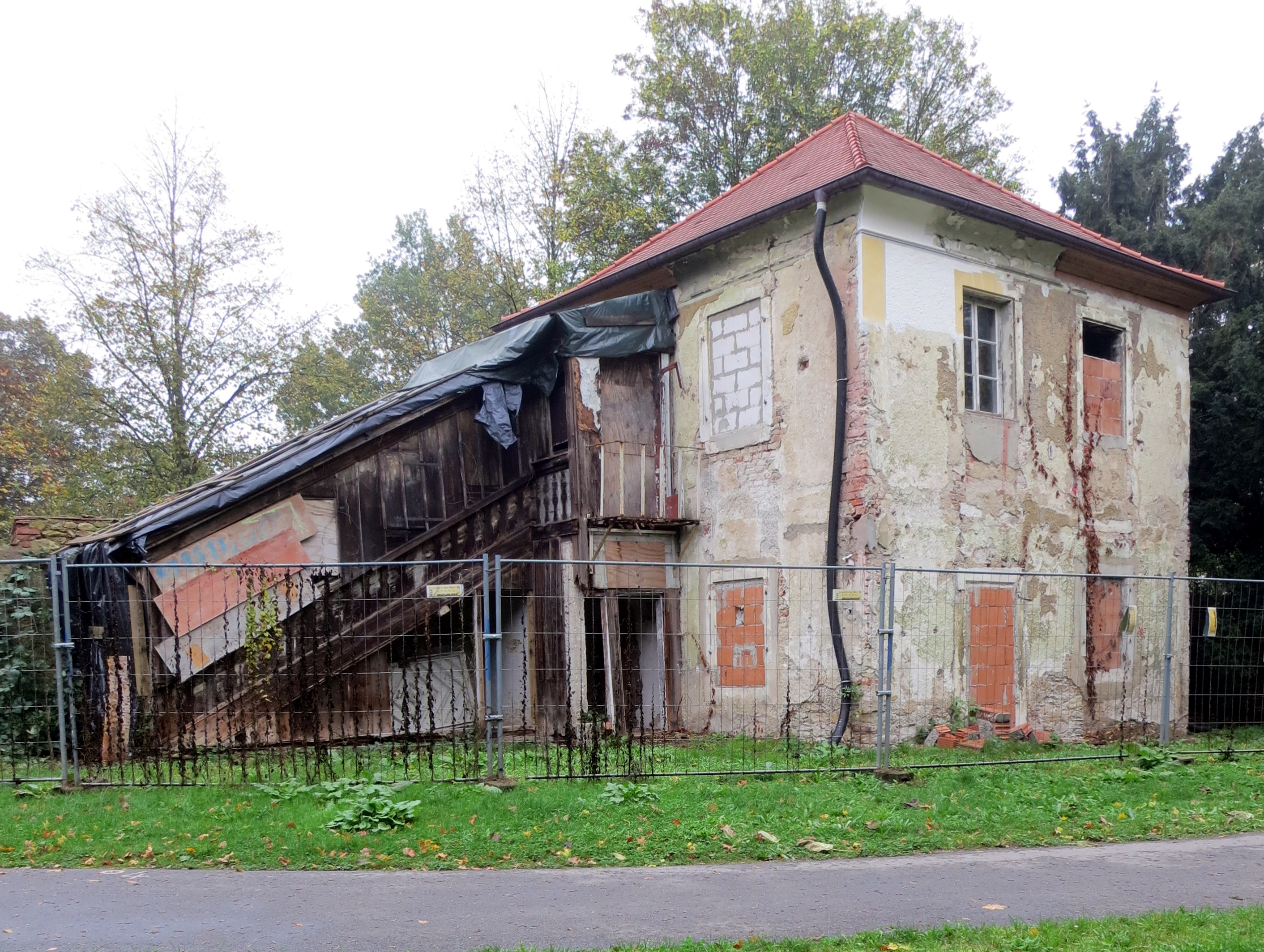 Gartenhaus (Salettl) im Karl Baur Park im Ortsteil Kumpfmühl von Regensburg - Ansicht aus SüdOst